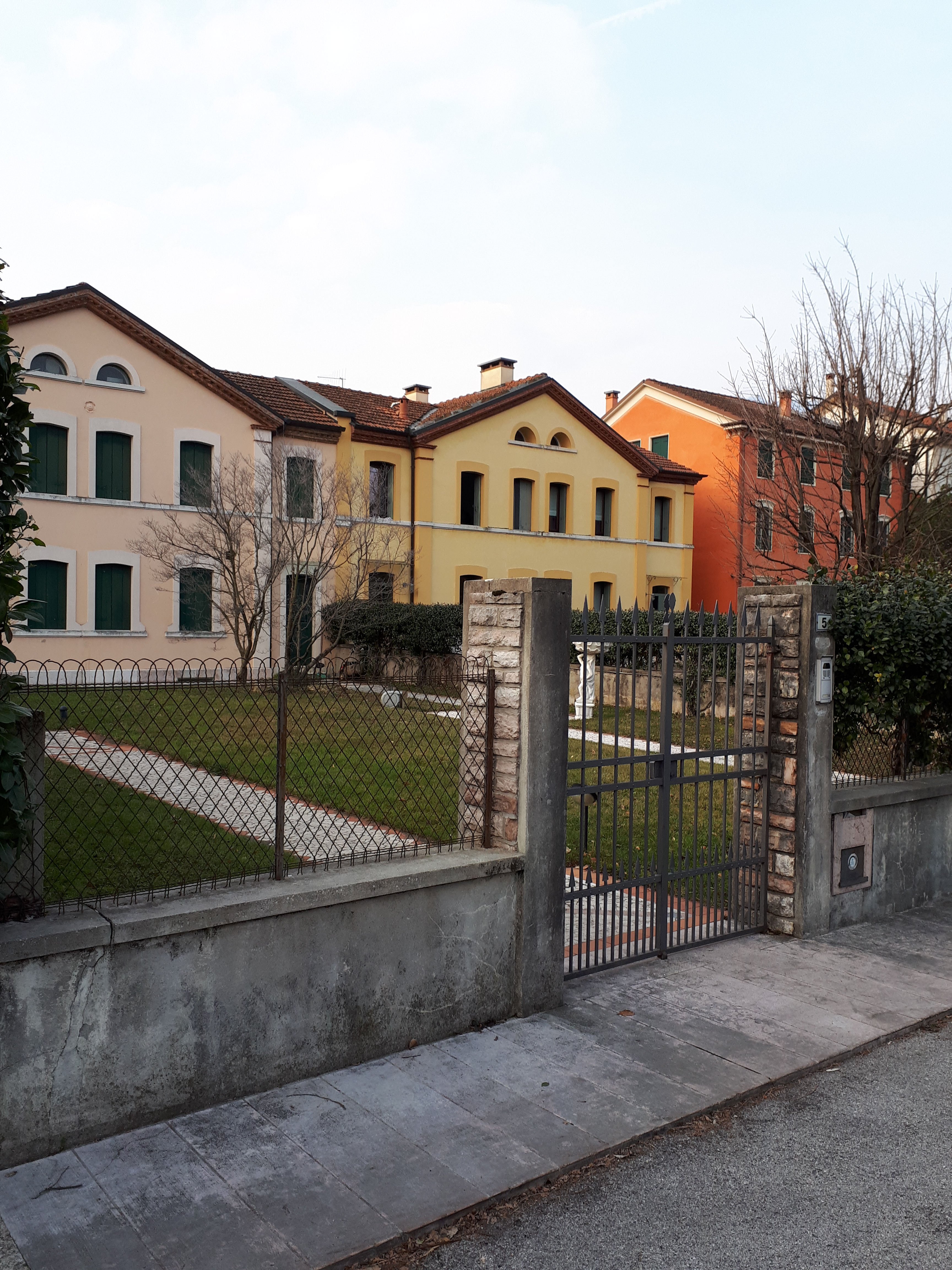 case per i pensionati in vicolo Tessitori